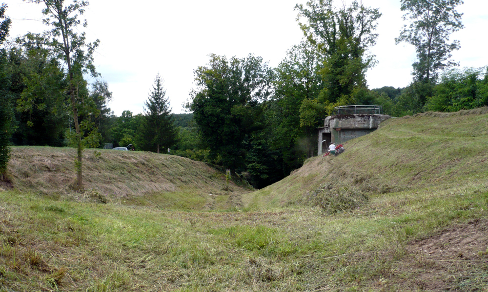 Der Keltenwall und später auch mittelalterliche Wallgraben bei Rheinau ZH